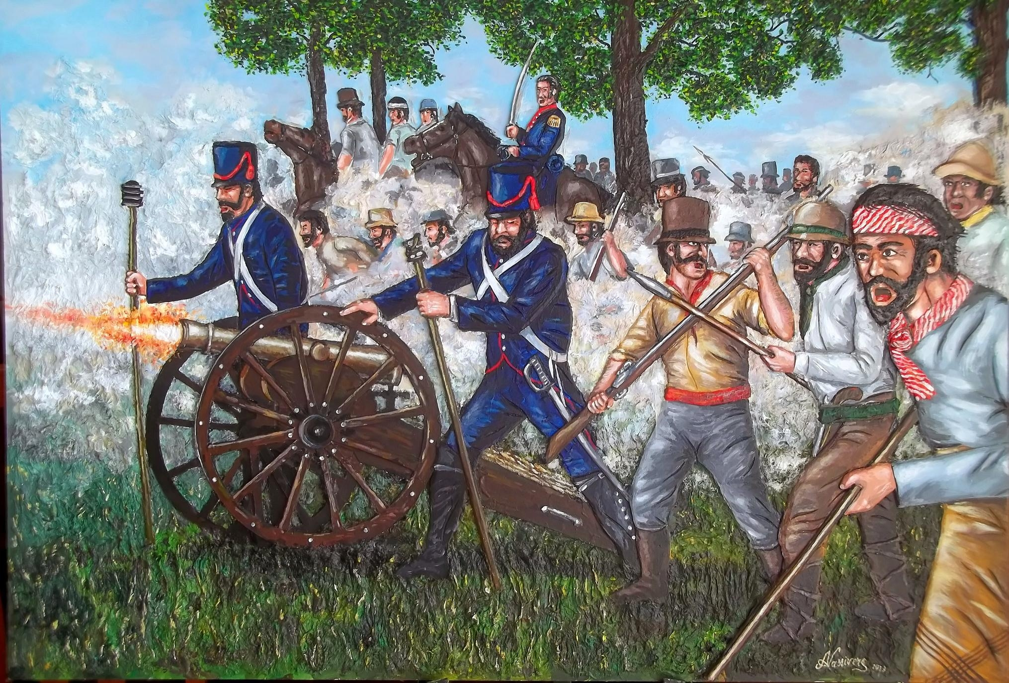 Pintura sobre relieve, 1,20 x 0,75 m. Escaramuza previa al Combate de San Lorenzo, donde participan los Miliicianos de Escalada. Autor: Alberto Nassivera